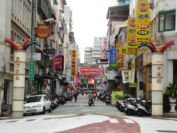 臺中市一中商圈的育才南街與雙十路口。